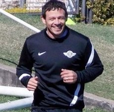 Futbolista paraguayo